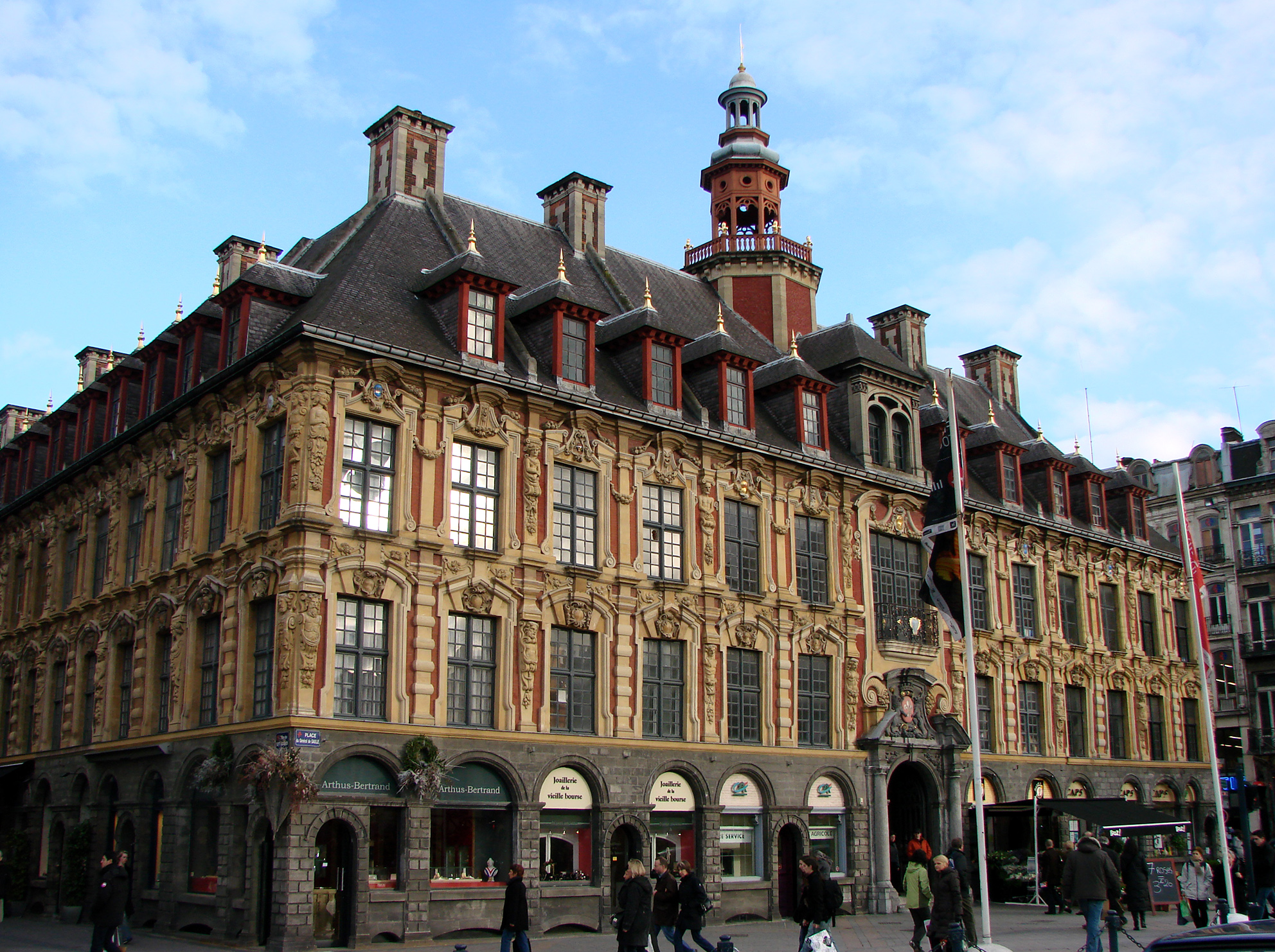 La Vieille Bourse (1652-1653), place du Général de Gaulle (ou Grand'place) à Lille.